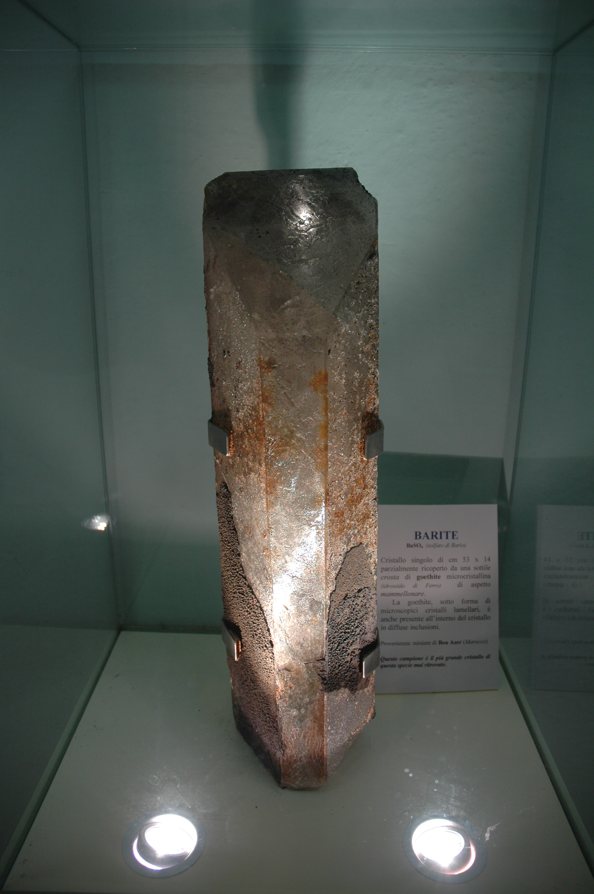 Campione di barite proveniente dalla miniera di Bou Azzer